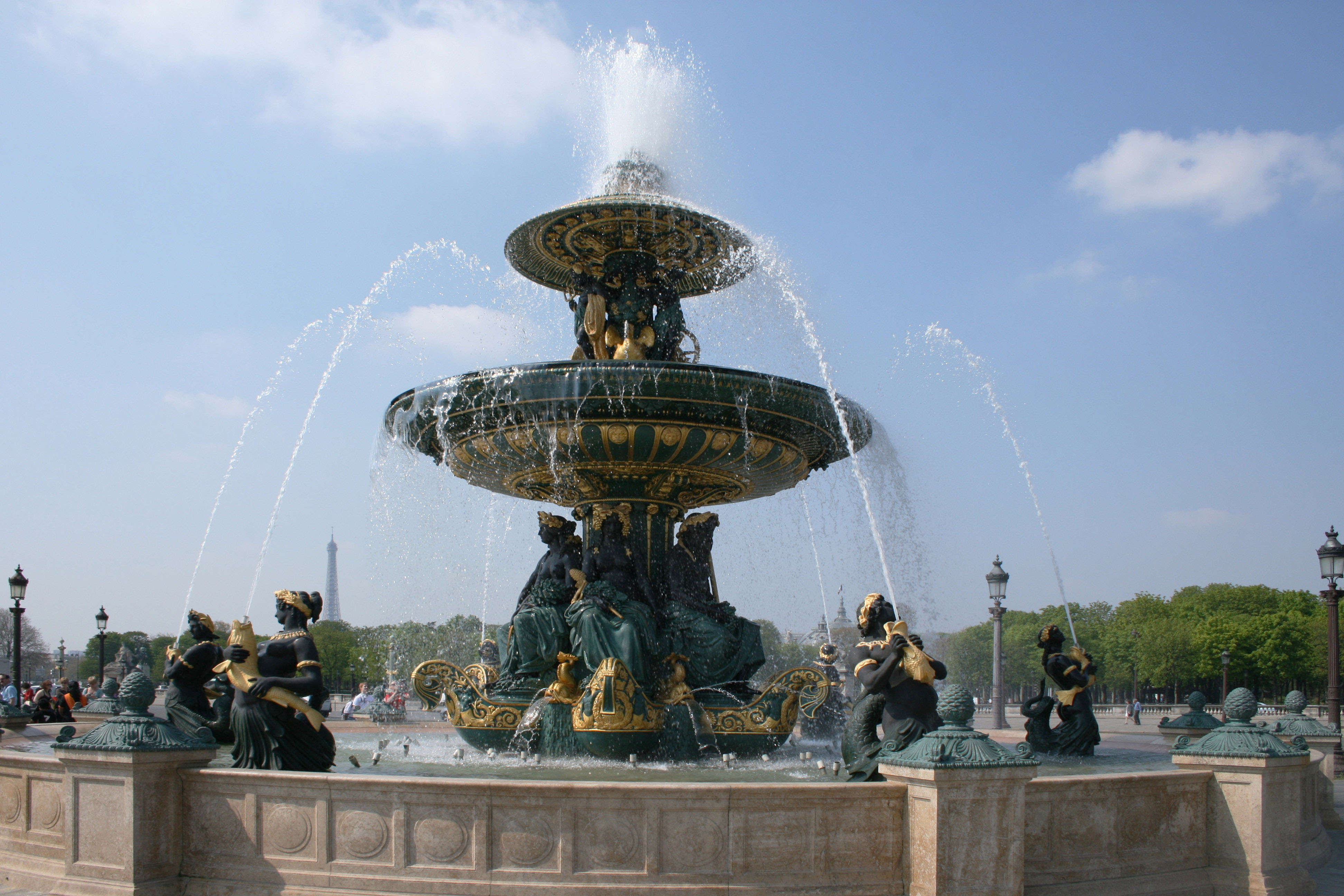 Fontaine sur la place de la Concorde à Pais